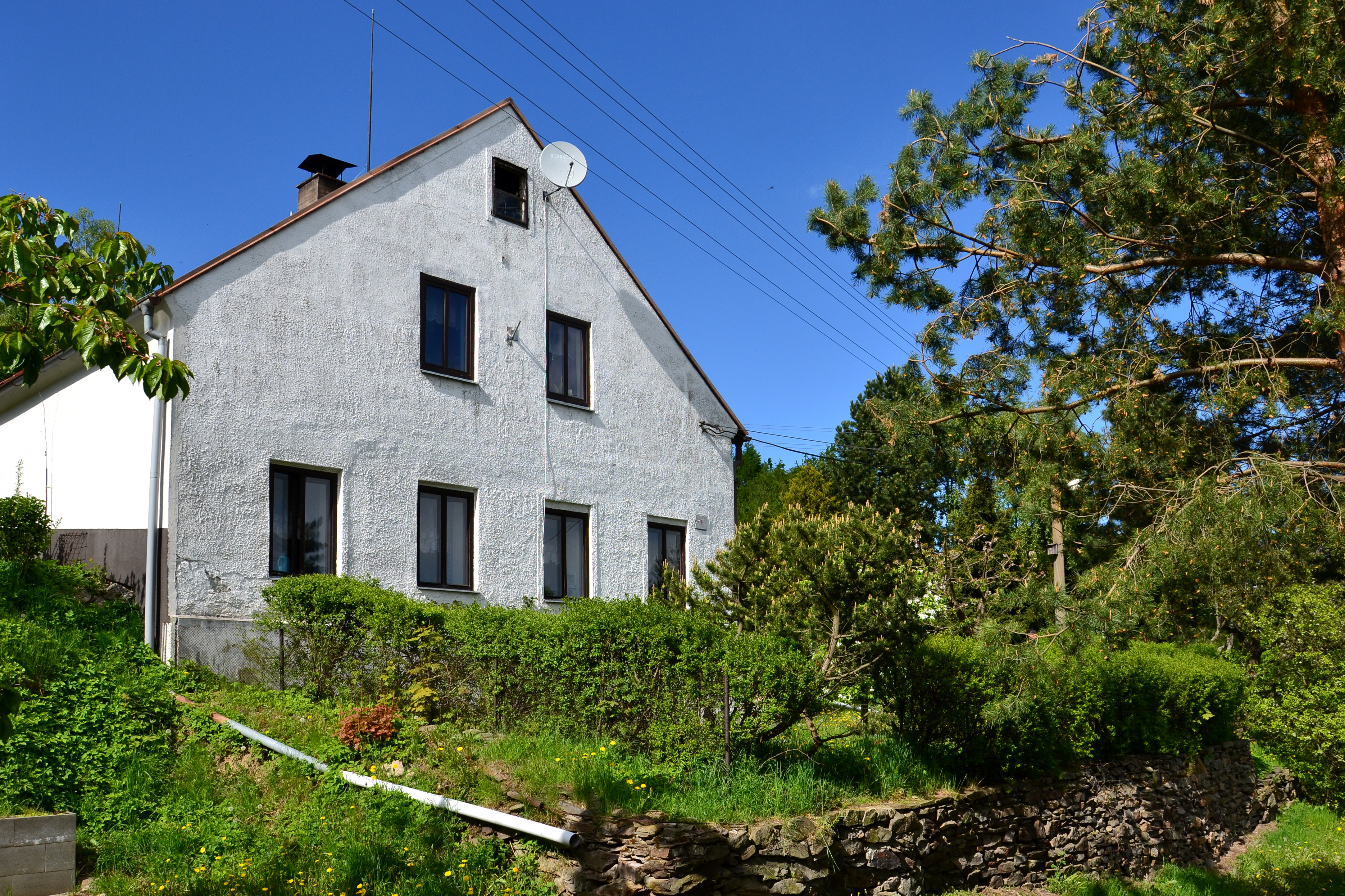 Dům čp. 13